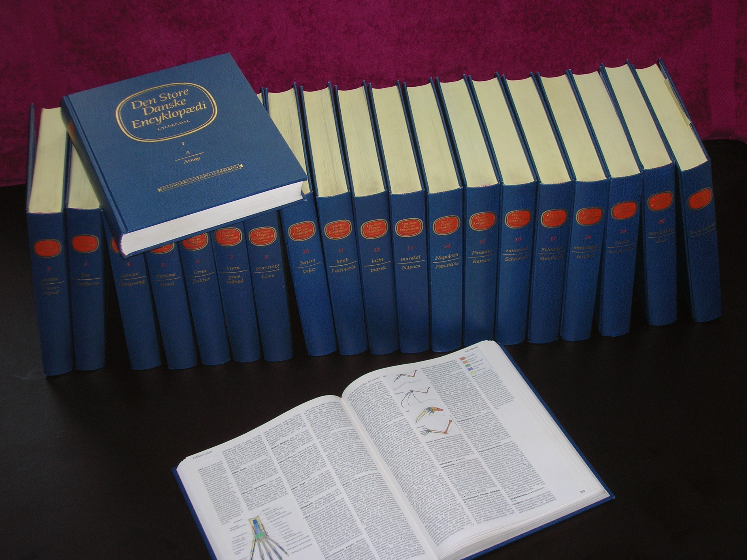 Den Store Danske Encyklopædi, volumes 1-20 plus supplement